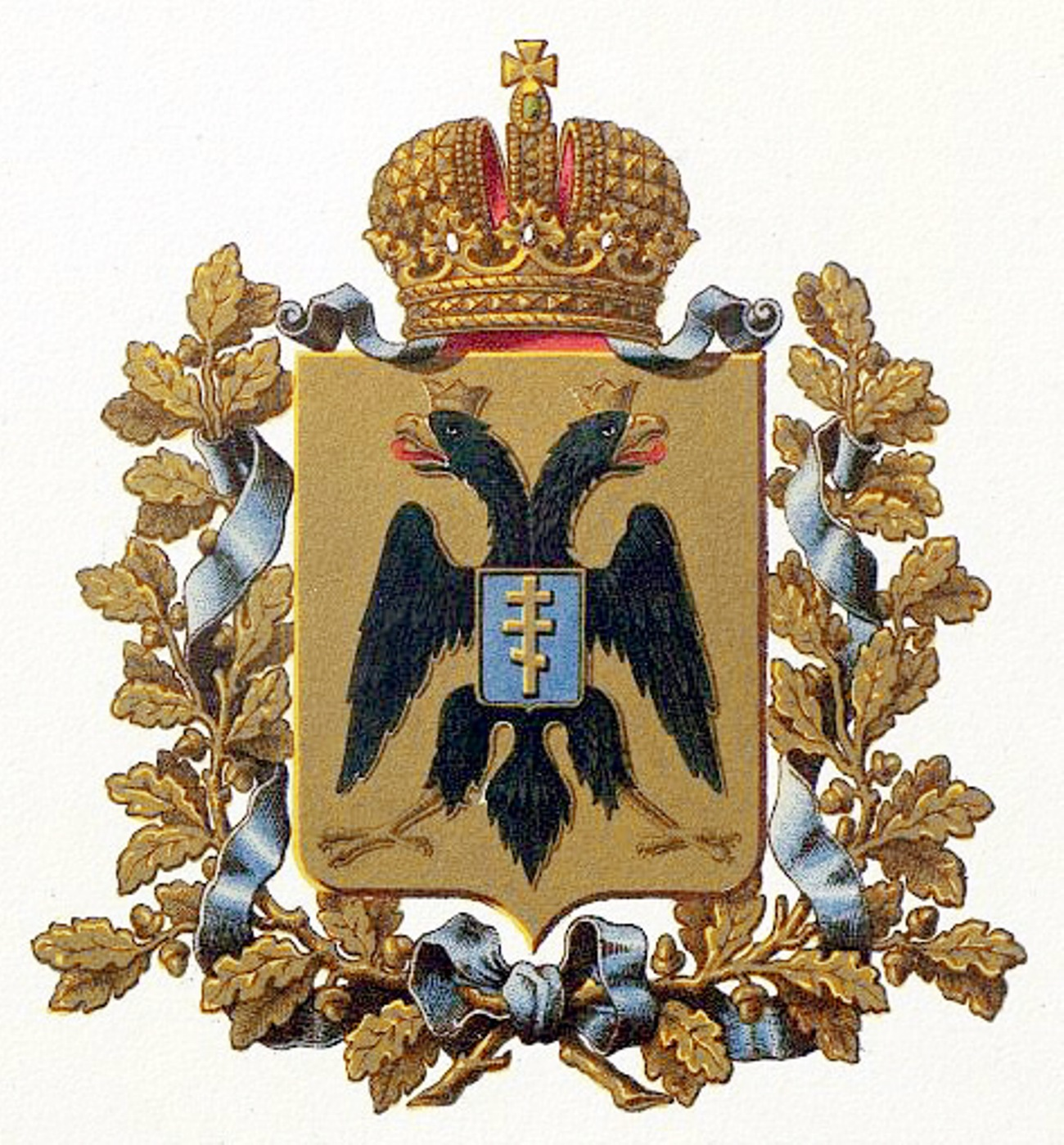 Official Russian Empire coat of arms Tavria Governorate. Герб Российской Империи Таврической губернии в Гербовнике МВД. Утверждён Императором Всероссийским Александром Вторым.